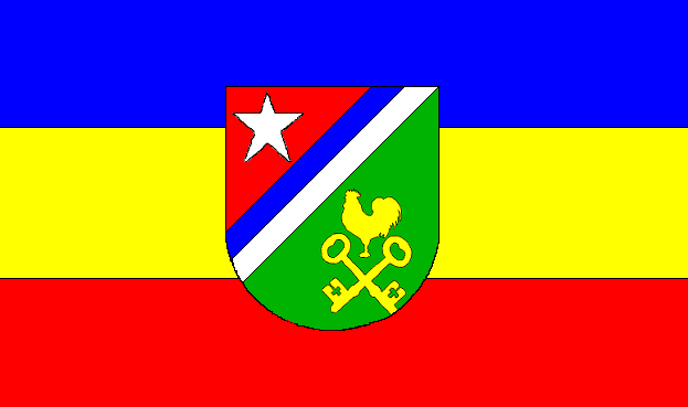 Bandera del municipio de Quivicán, Provincia de Mayabeque, Cuba.